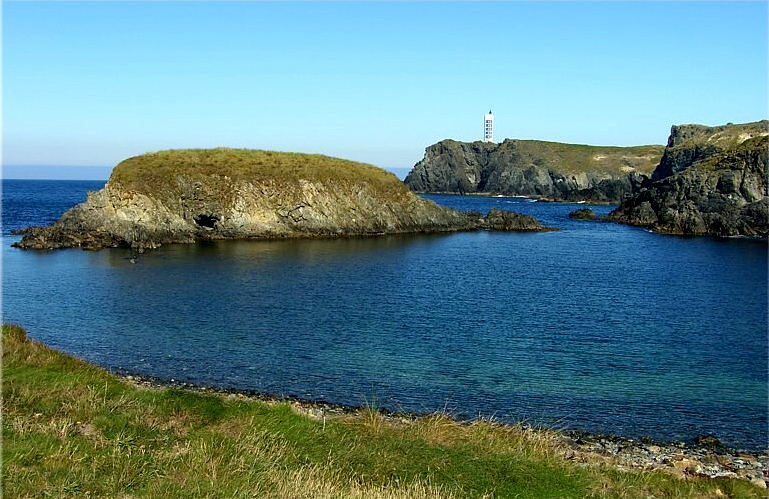 Faro de Punta Frouxeira, Valdoviño, Galicia (Spain)